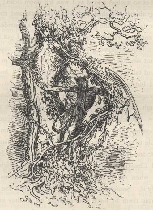 Ilustração de Gustave Doré para a edição de 1863 de "Dom Quixote" de Miguel de Cervantes